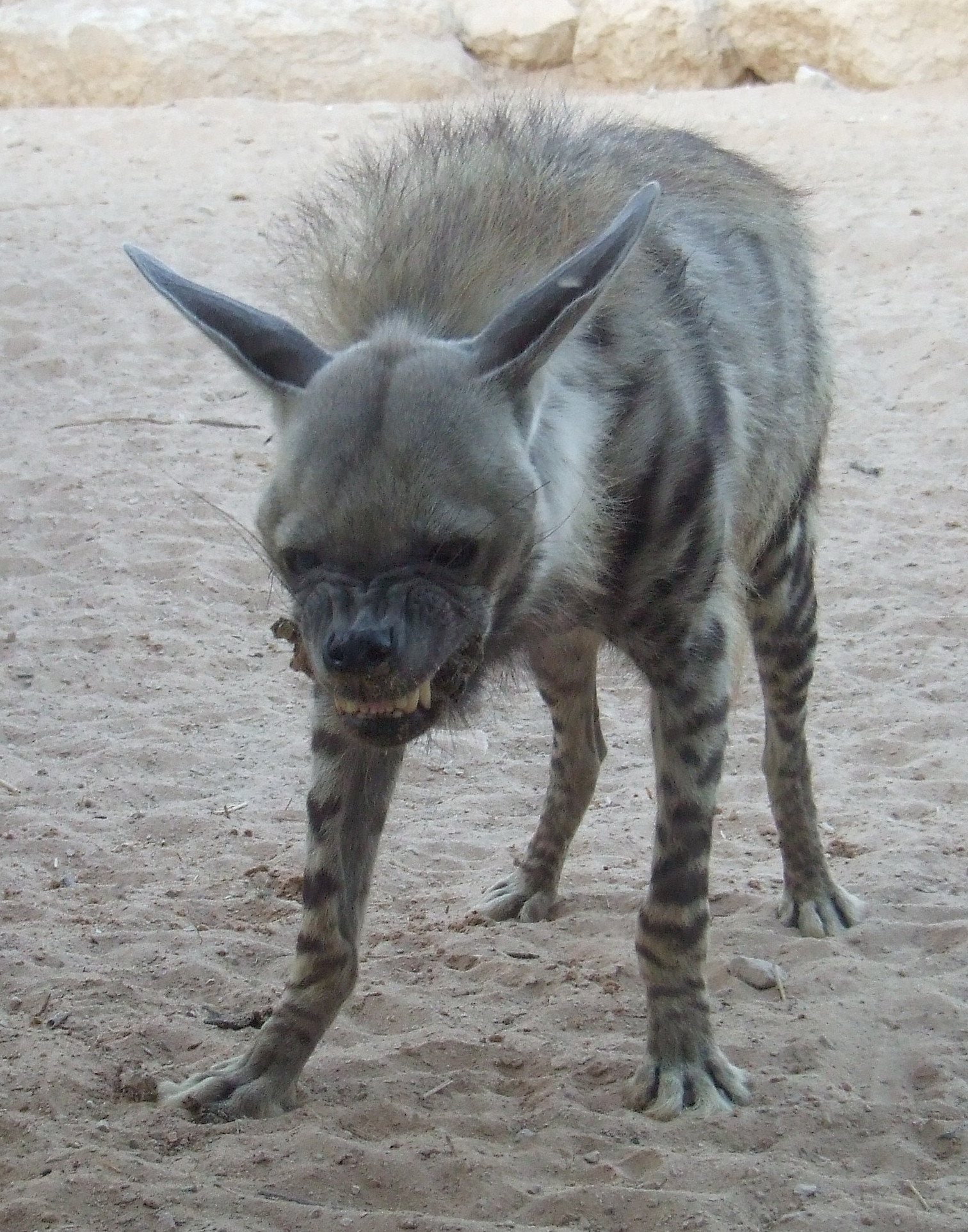 Hyaena hyaena